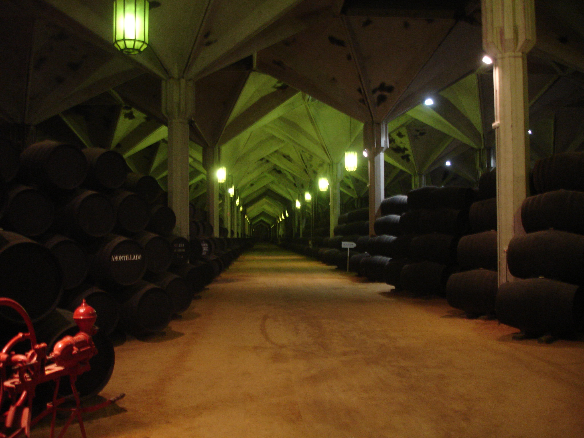 Williams & Humbert Bodega in Jerez, Andalusia (Spain)